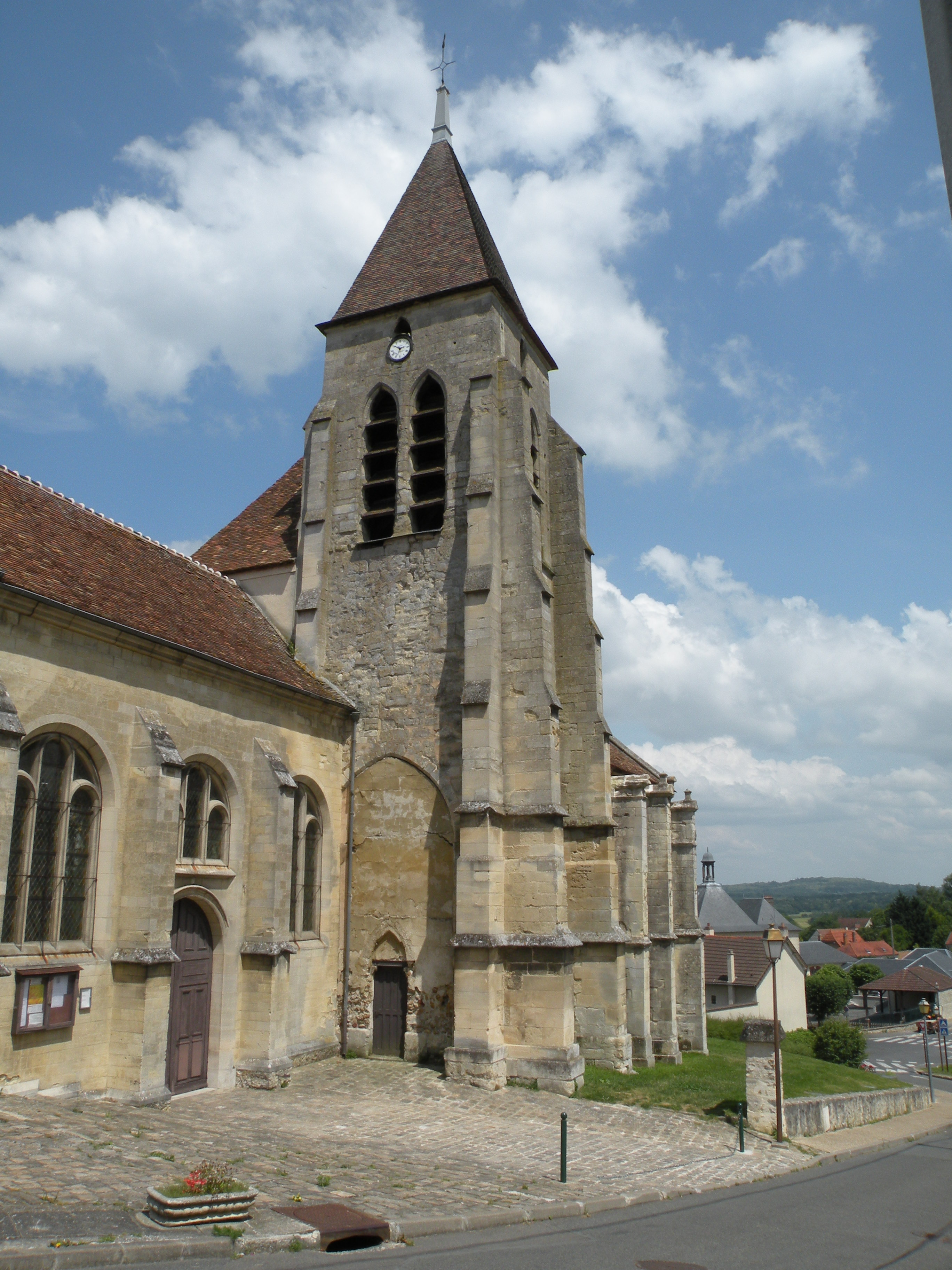 eglise de Villiers-Adam